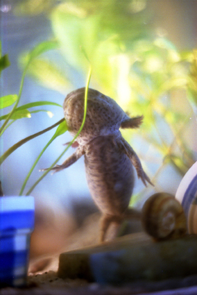 Même le petit escargot du premier plan a fini dans l'estomac vorace de mon axolotl !